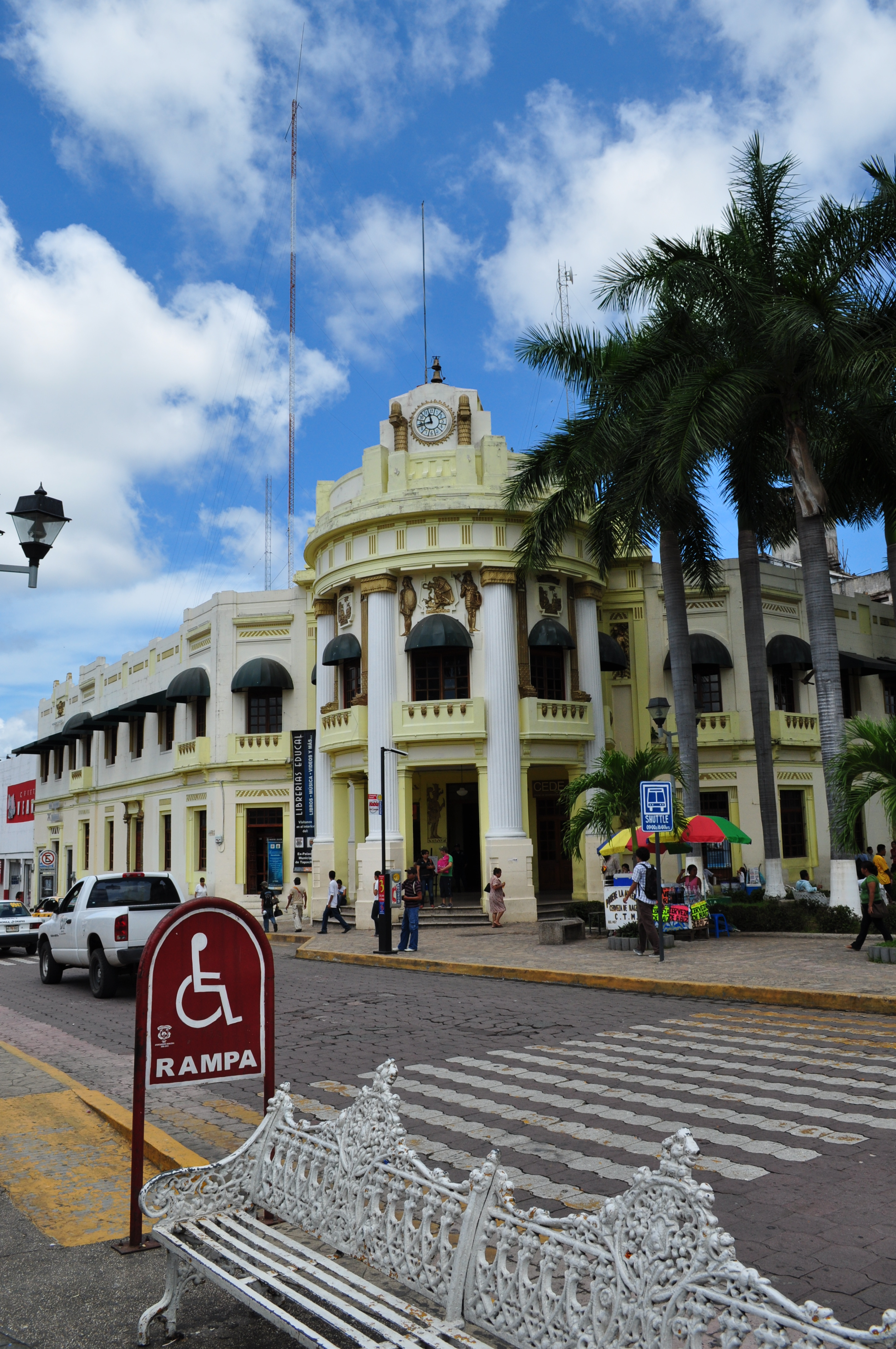 Haus der Kultur